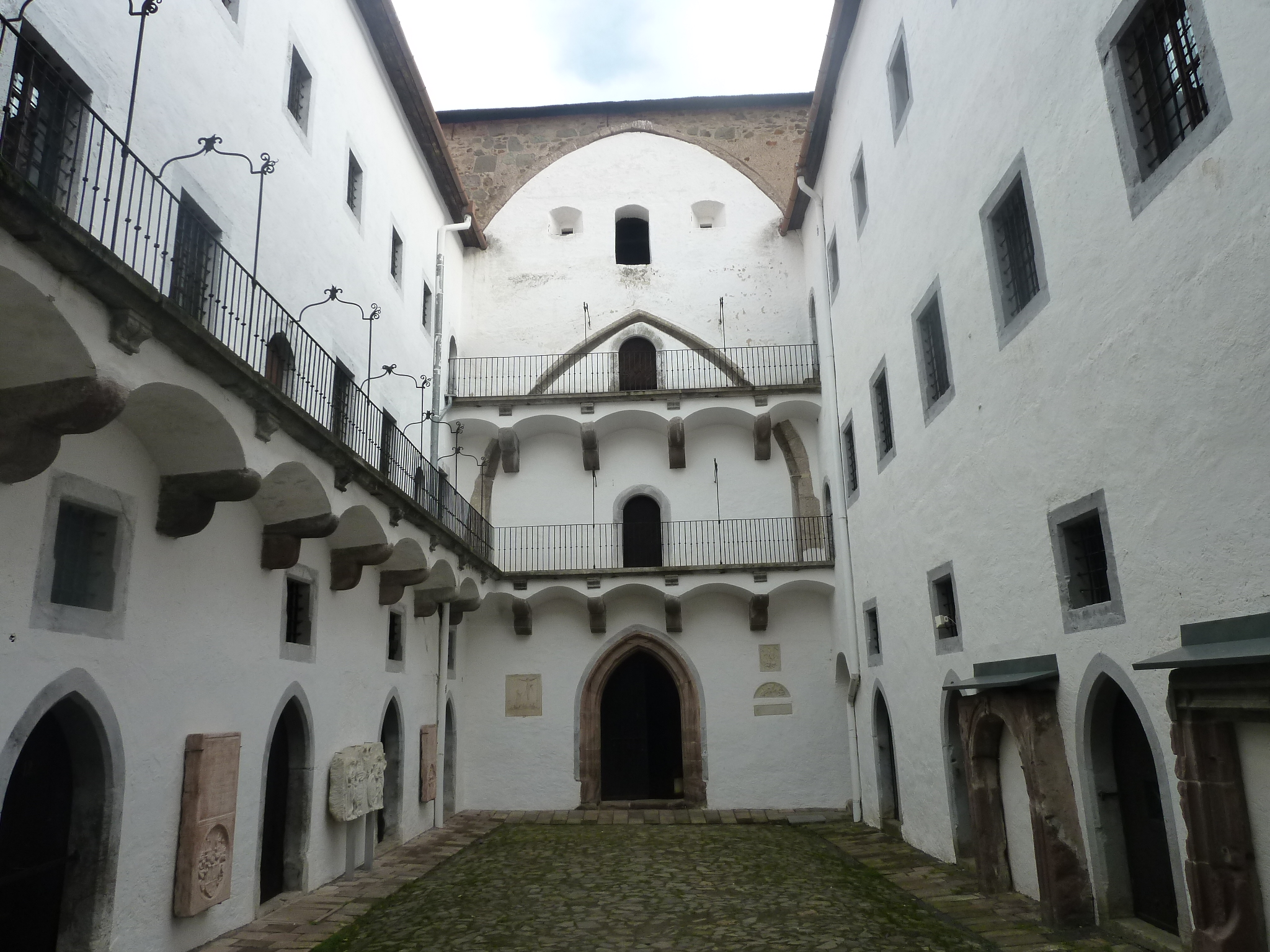 Nádvorie Starého zámku v Banskej Štiavnici